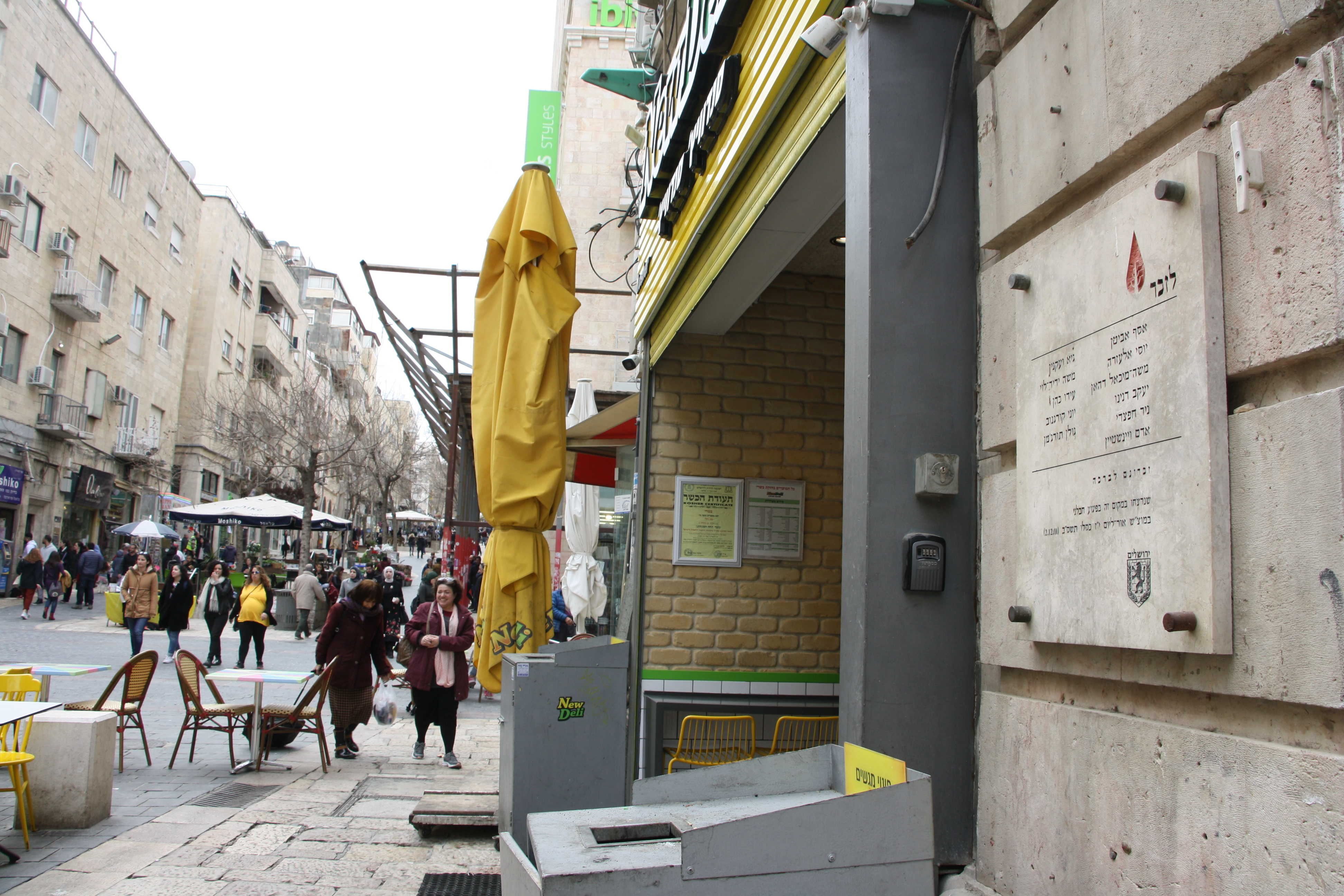 לוח זיכרון מדרחוב בן יהודה ירושלים